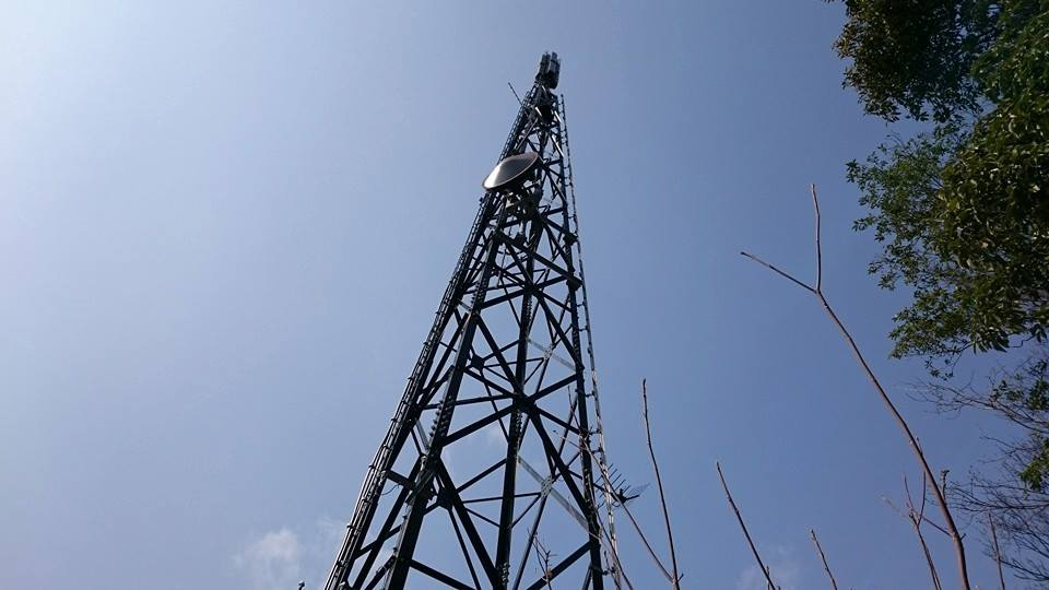 2015年3月22日 撮影